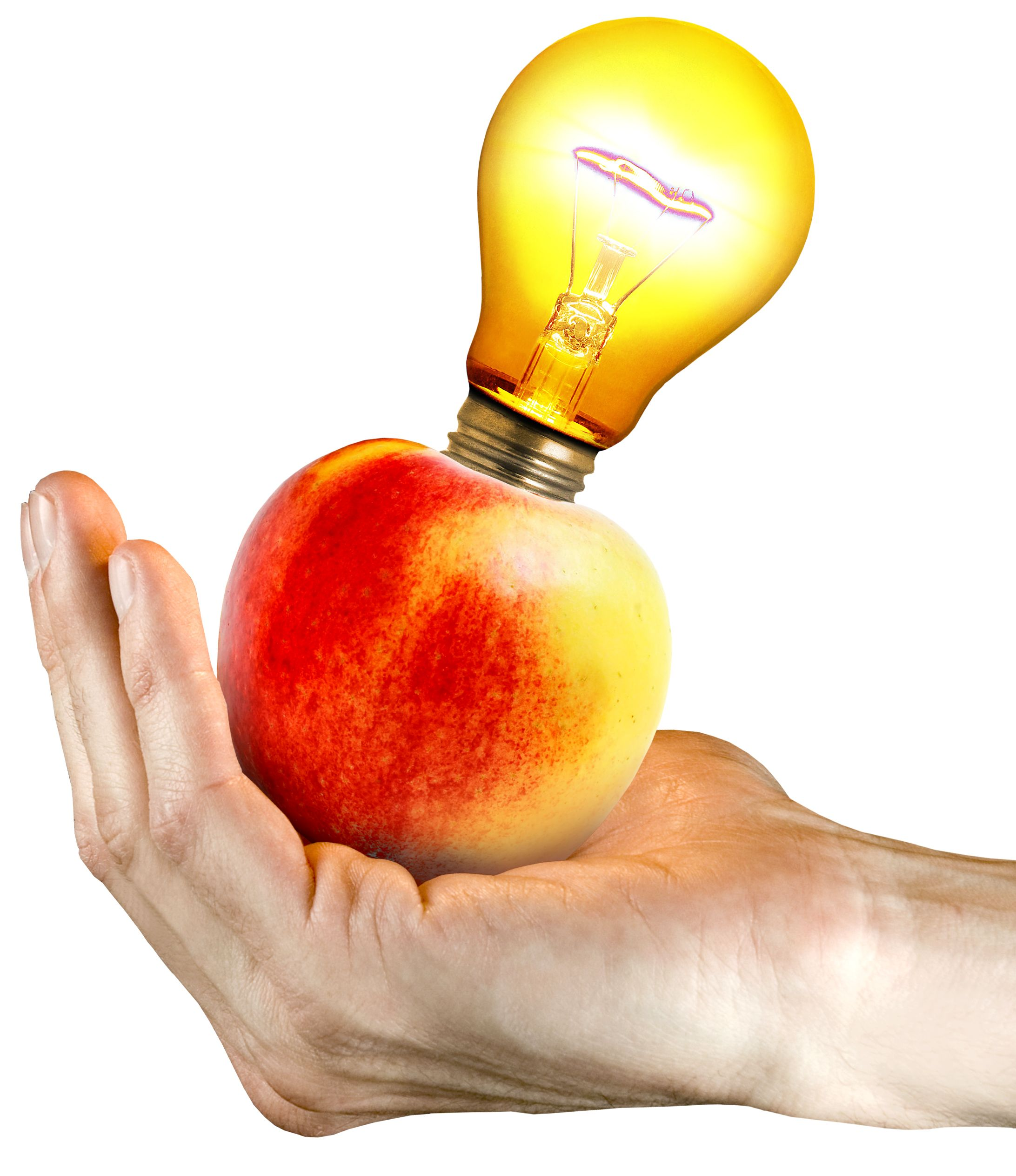 Õpilasleiutajate riiklik konkursi logo - õun-pirn